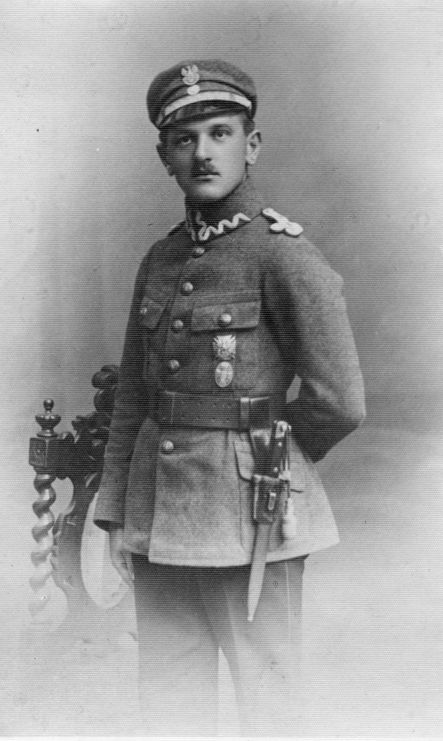 Podporucznik 1 p p legionów Stanisław Zaucha w 1919r.